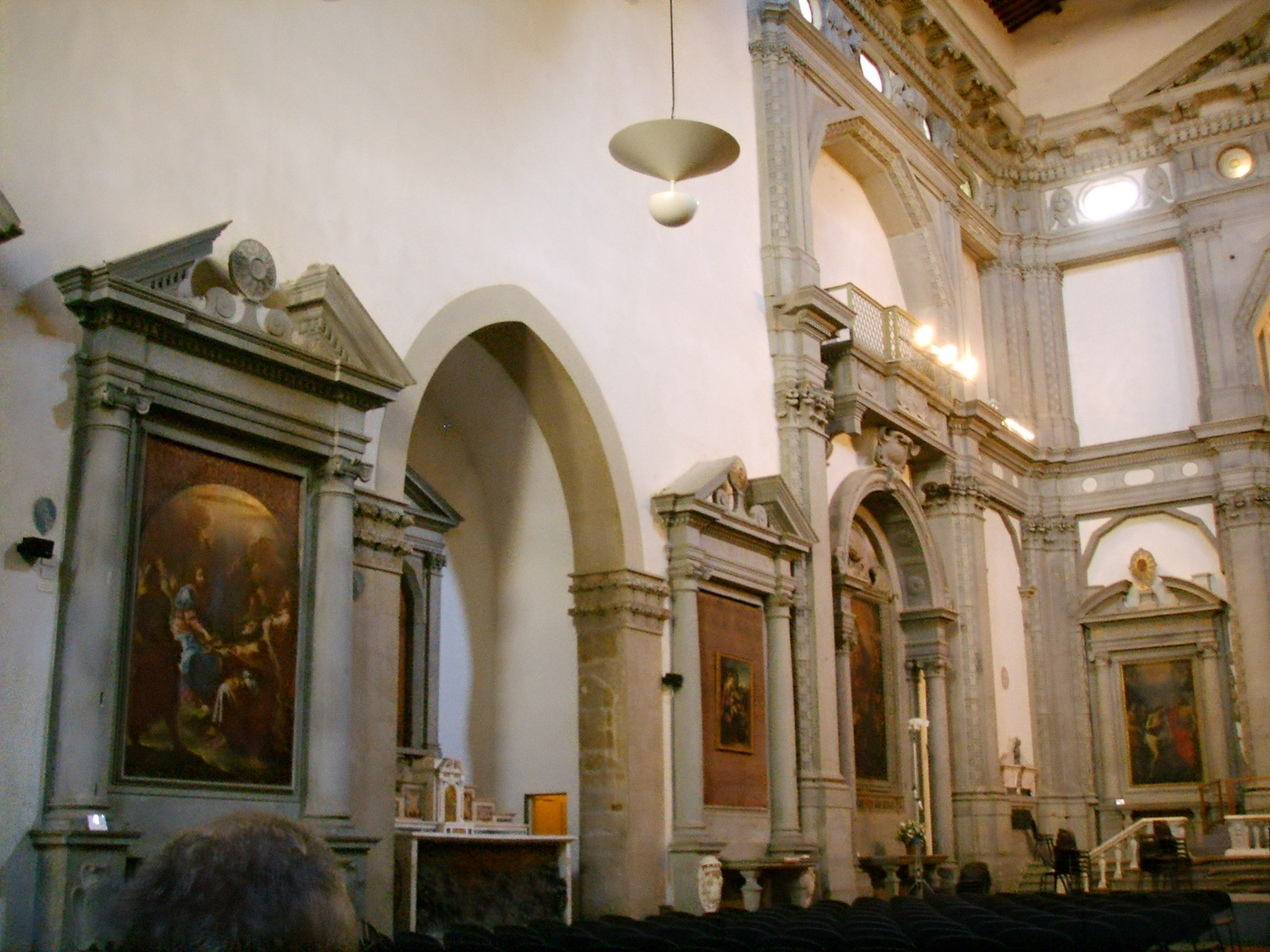 Santo Stefano al Ponte, lato sinistro